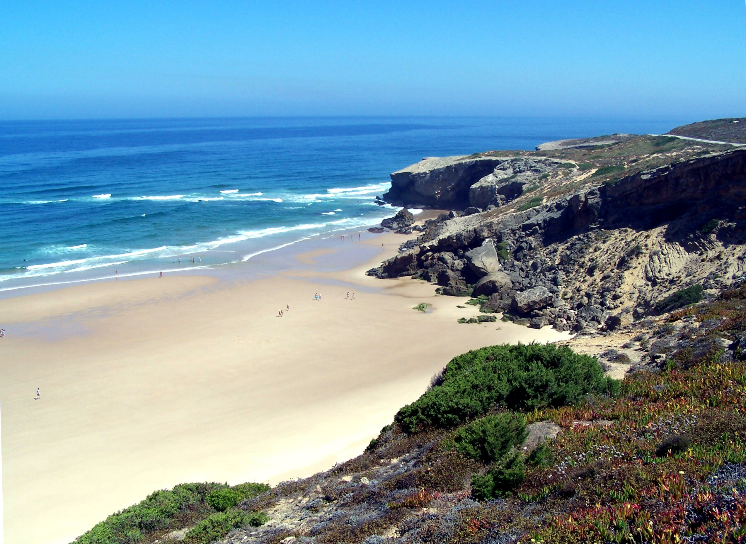 Praia do Monte Clérigo - II